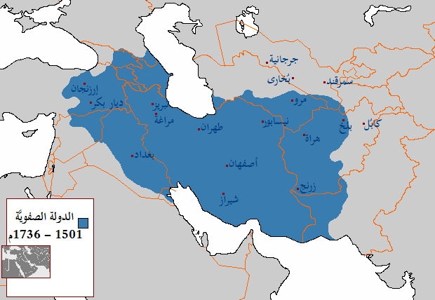 خارطة تُبيِّن أقصى امتداد بلغته الدولة الصفويَّة خلال عهد الشاه إسماعيل الأوَّل بين حيدر.